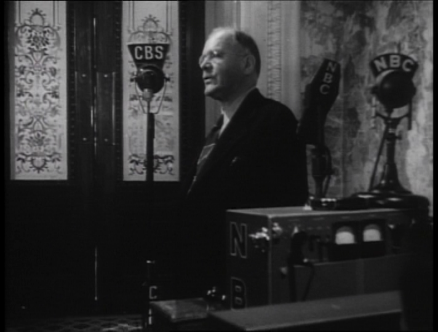 H. V. Kaltenborn in Mr. Smith Goes to Washington